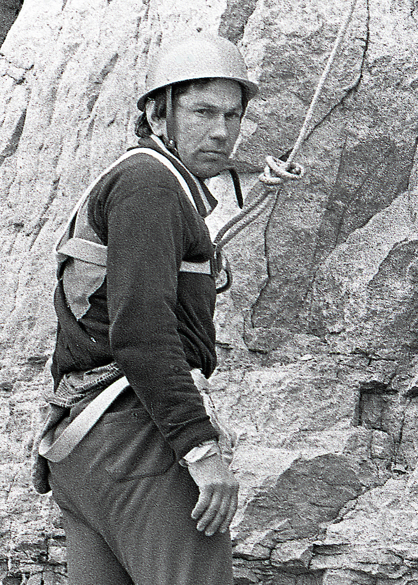 Lembit Hiiesalu